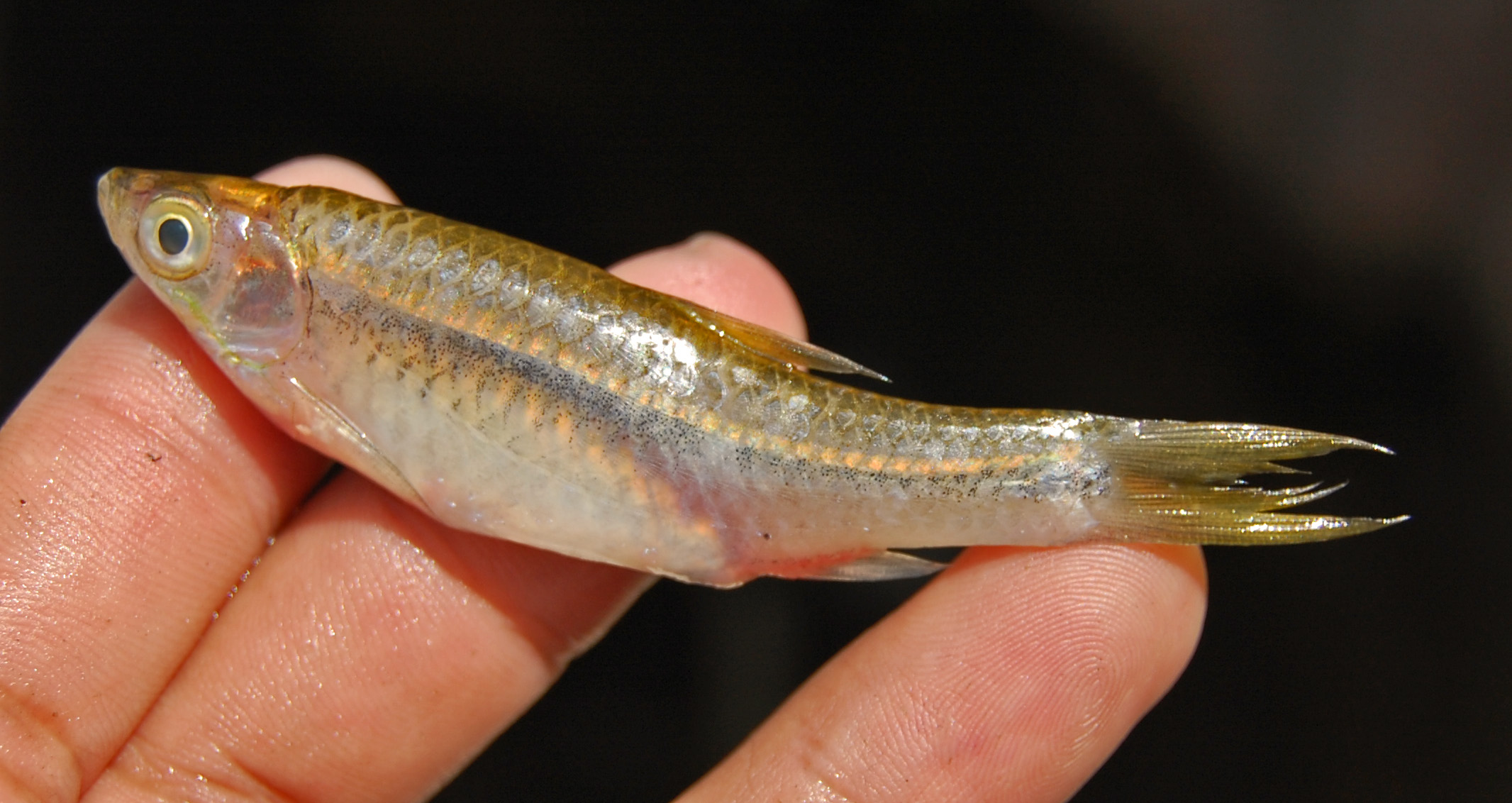 Rasbora argyrotaenia (60mm SL). From Rawagembol, Prembun, Tambak (7°38.3’S 109°23.9’E), Banyumas, Central Java, Indonesia